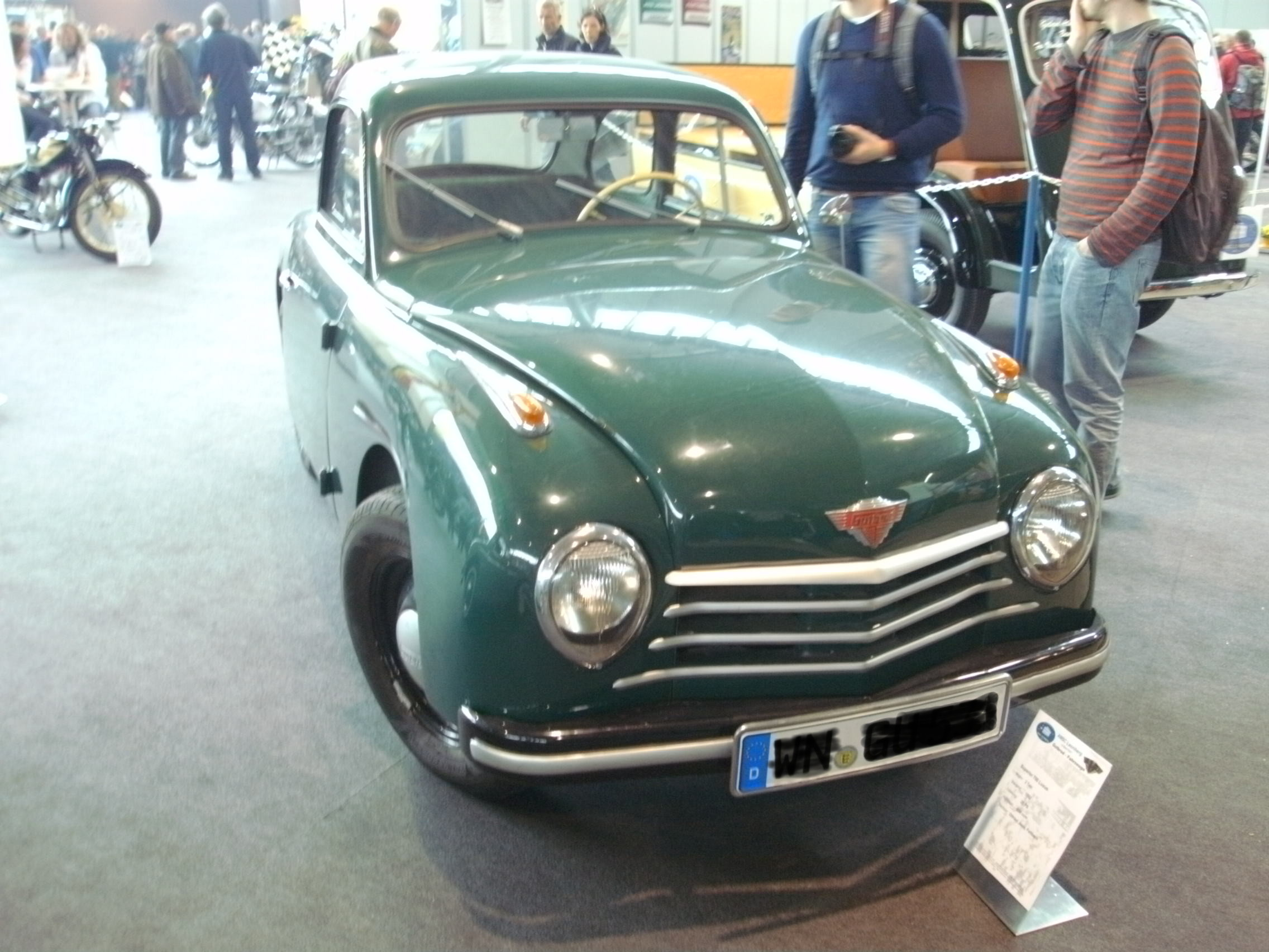 Gutbrod Superior 700 auf Retro Classics Stuttgart 2014